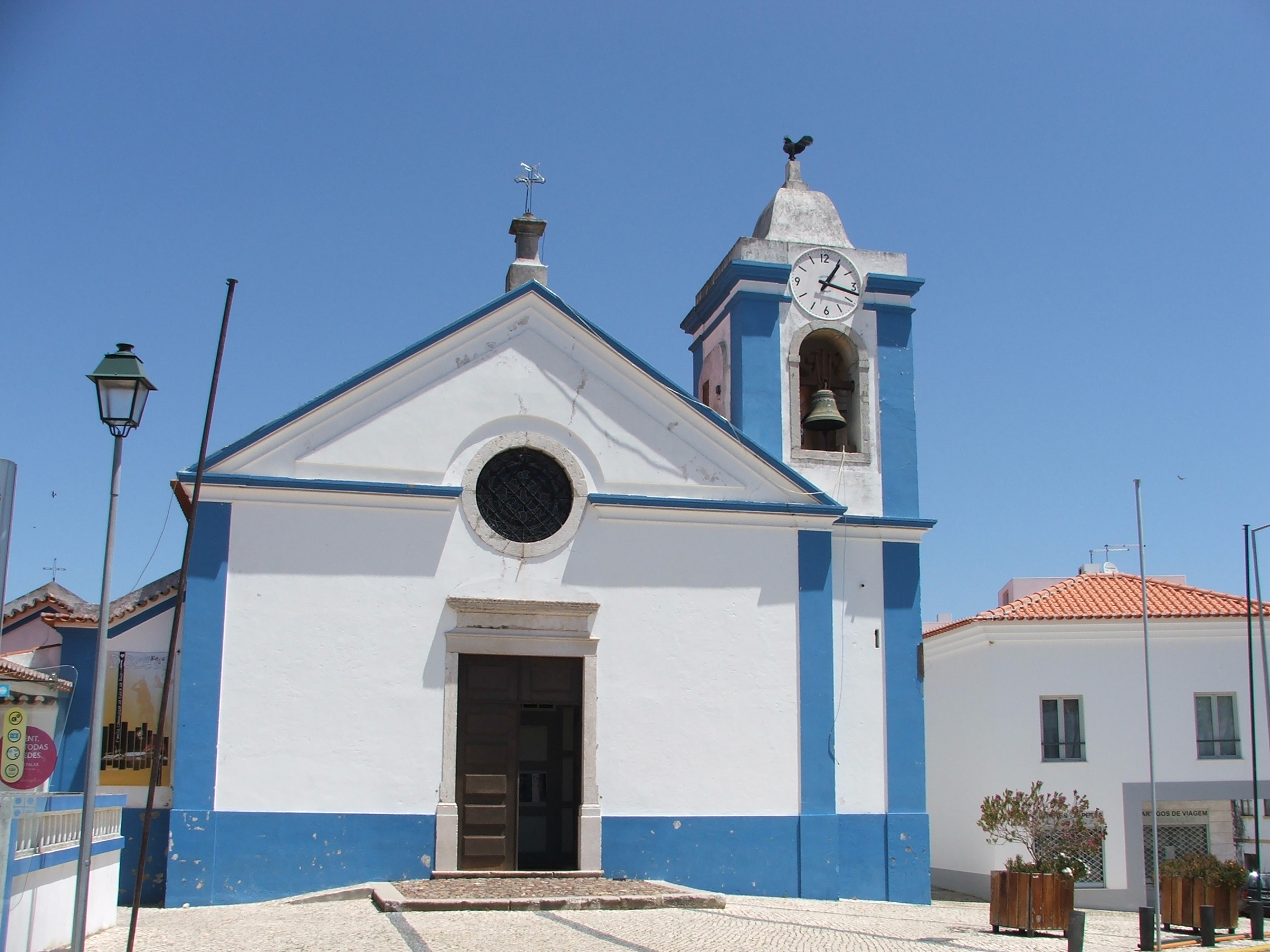 São Teotónio, Portugal, Alentejo, Odemira, Kirche